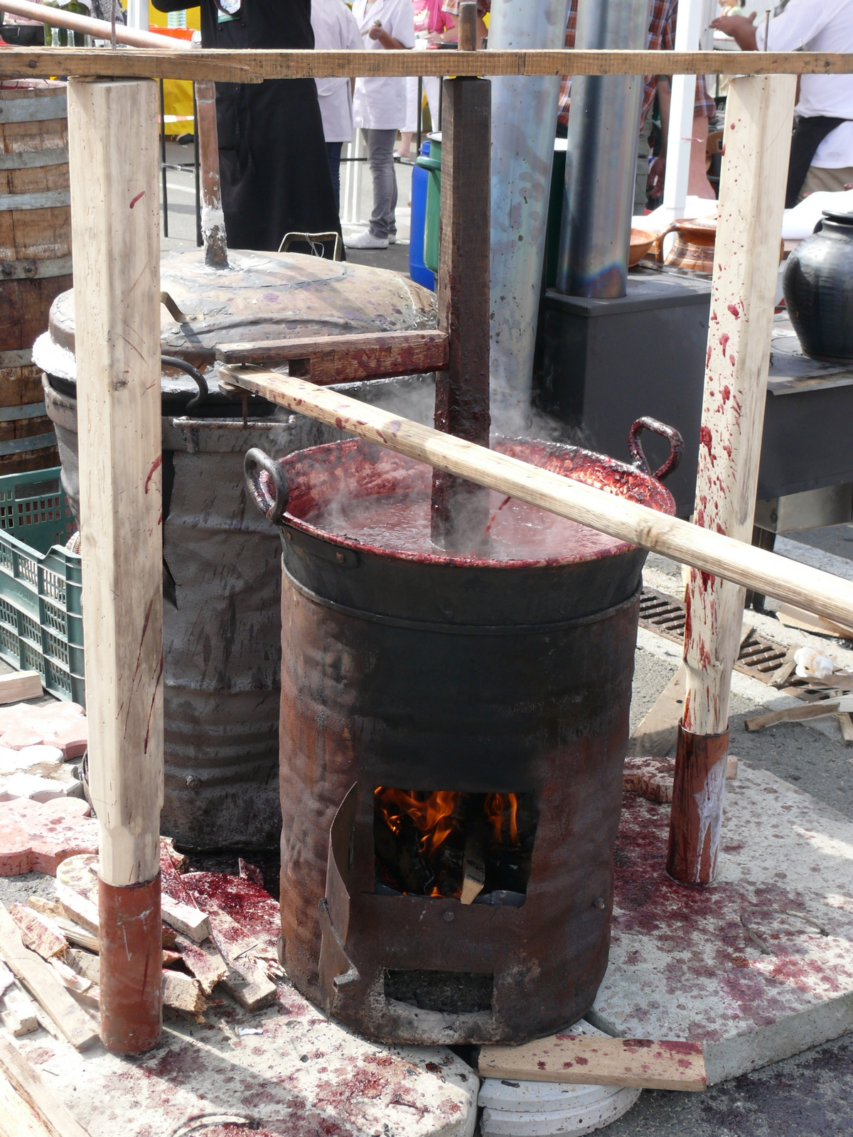 Prepararea Silvoiţei